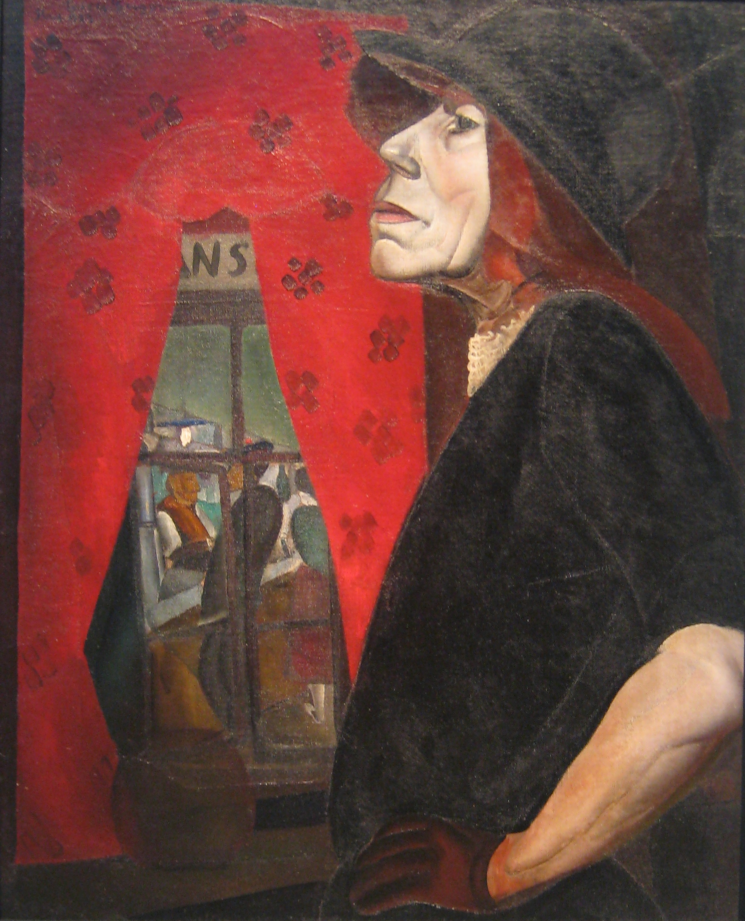 Григорьев Борис Дмитриевич. Марсельская шлюха. 1923. Из цикла Boui-boui au bord de la mer. Дублированный холст, масло. Seupherot Foundation